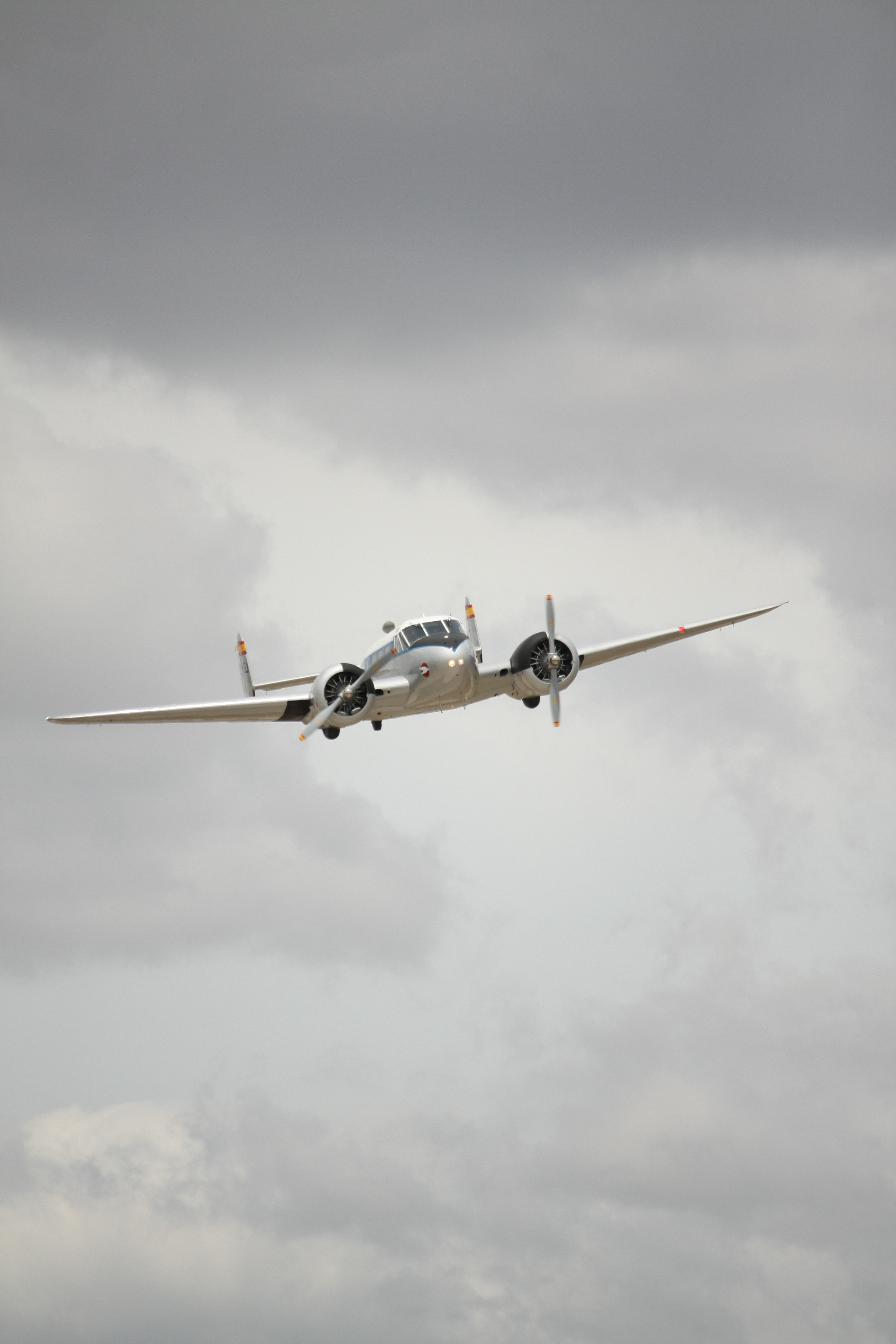 Spantax Beech C-45H Expeditor (18) de la Fundación Infante de Orléans en Cuatro Vientos, Madrid, España.